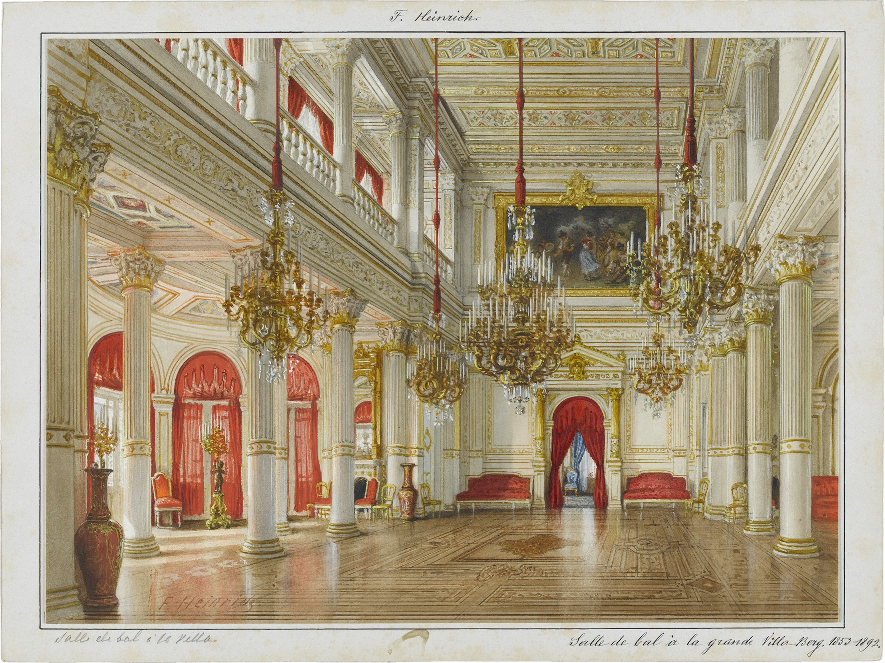 Stuttgart. Franz Heinrich: Ballsaal der Villa Berg. Aquarell: 29,2 × 39,5 cm.